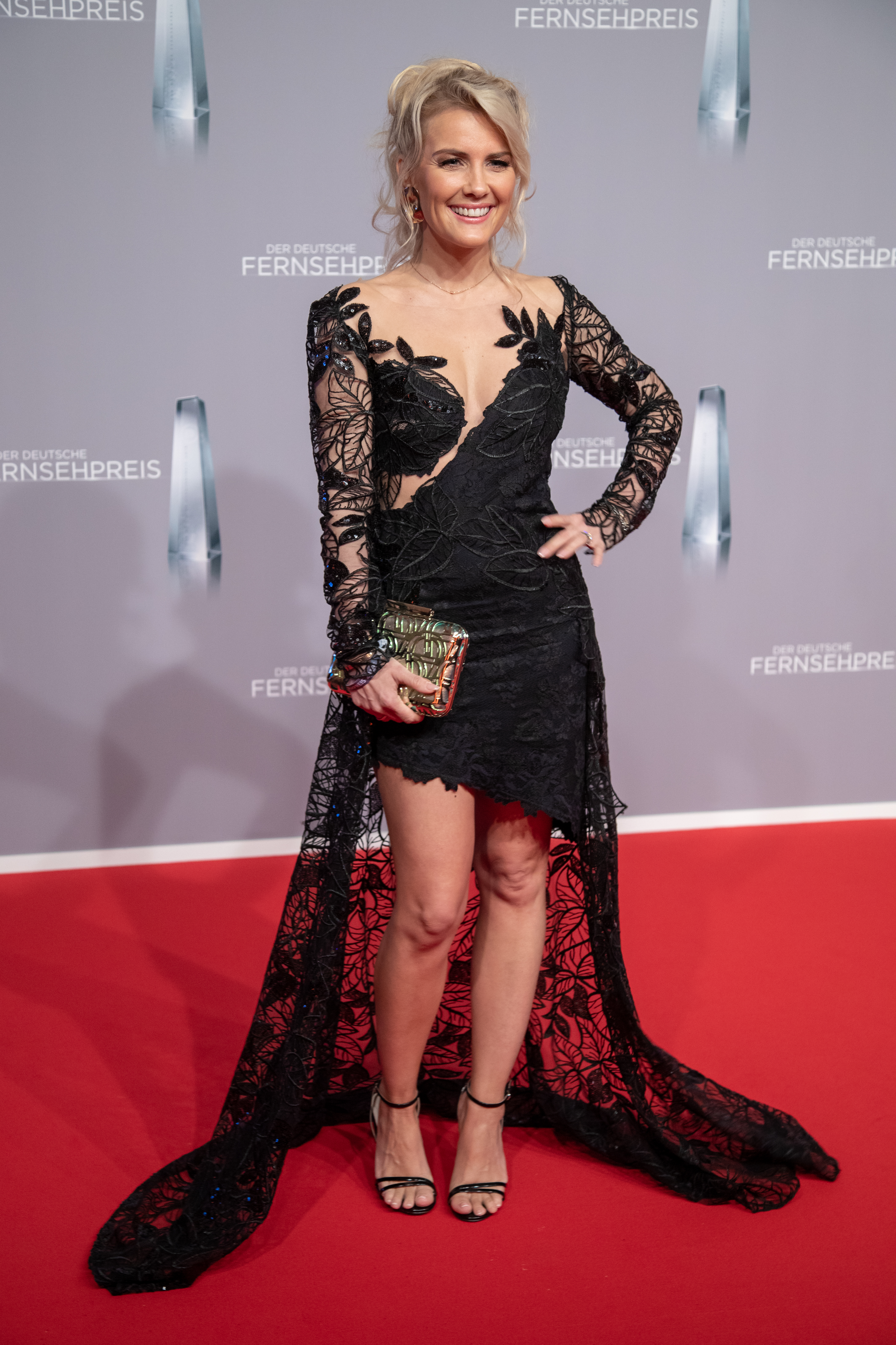 Jennifer Knäble beim Deutschen Fernsehpreis 2019 in der Düsseldorfer Rheinterrasse